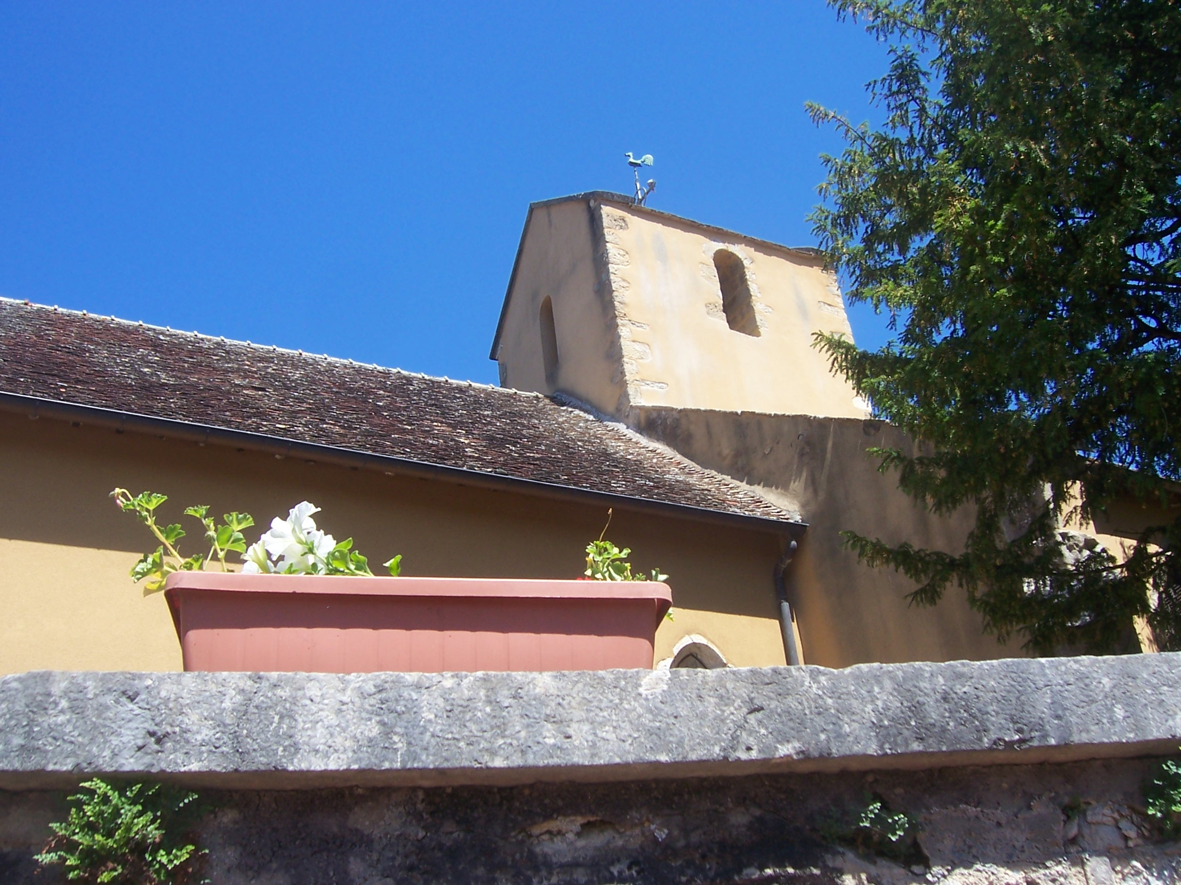 Eglise de Charrecey